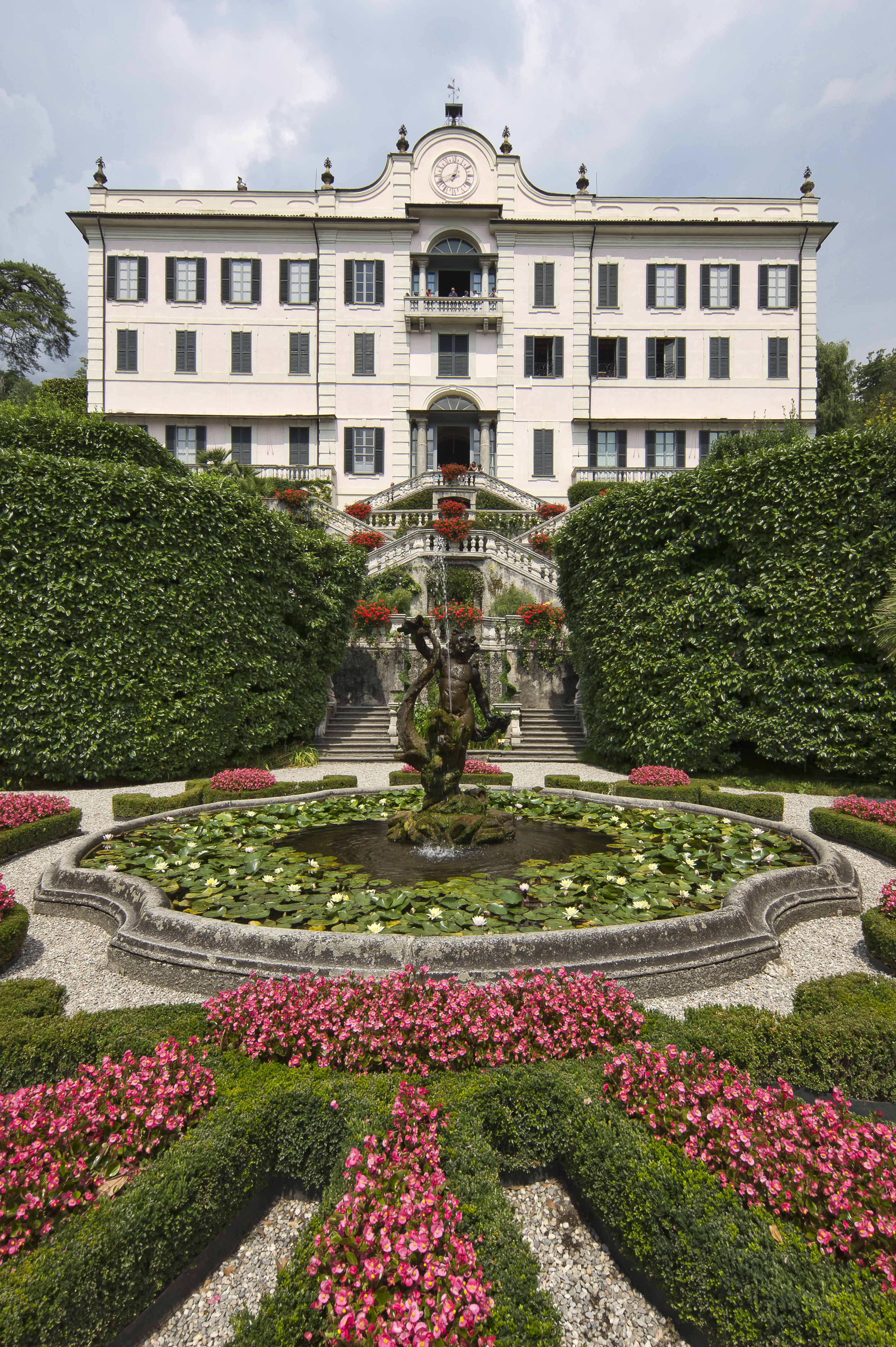 Villa Carlotta - Lac de Côme en Iatlie